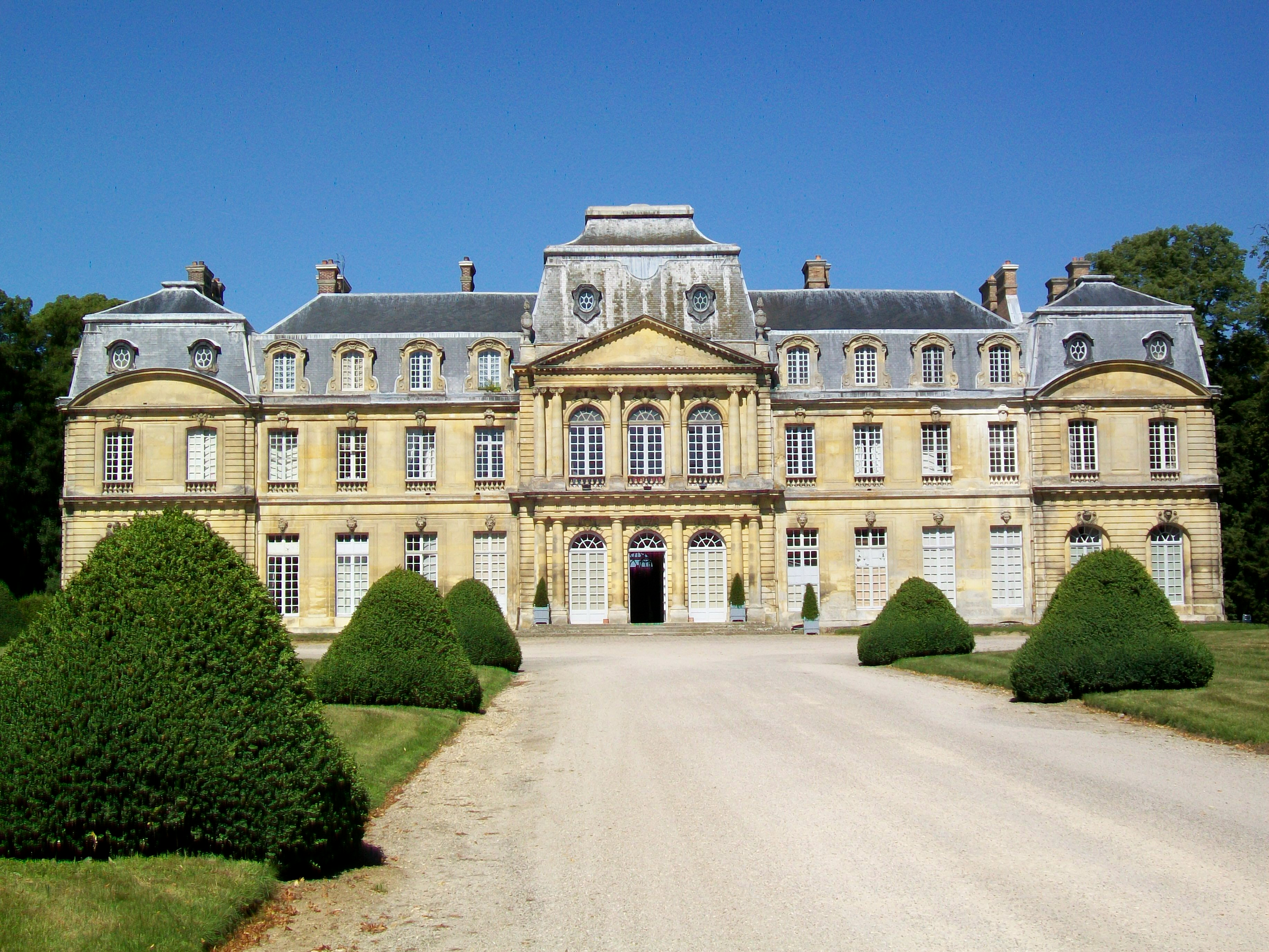 Façade est sur la cour. De ce côté, les frontons ne sont pas sculptés.